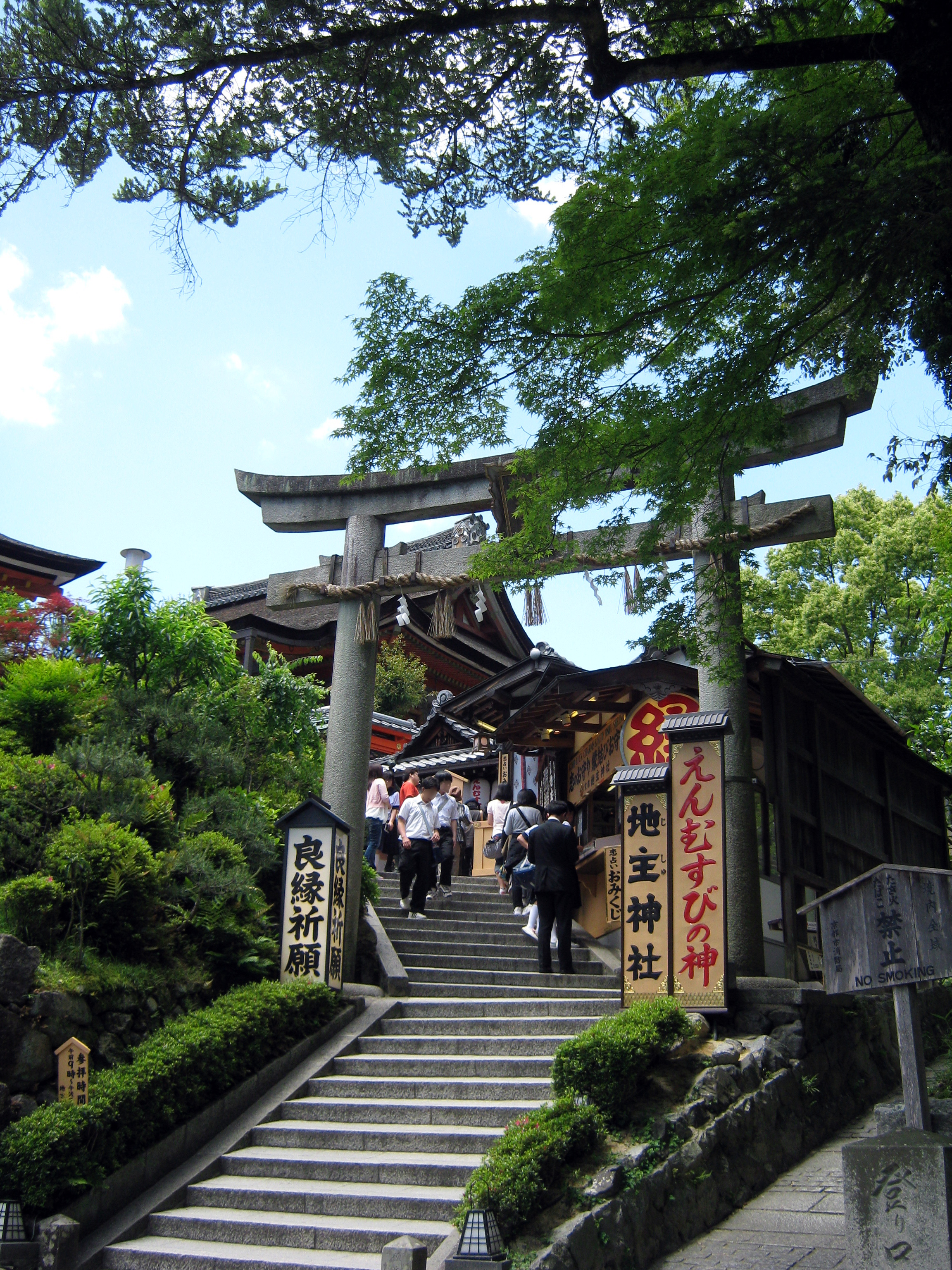 地主神社